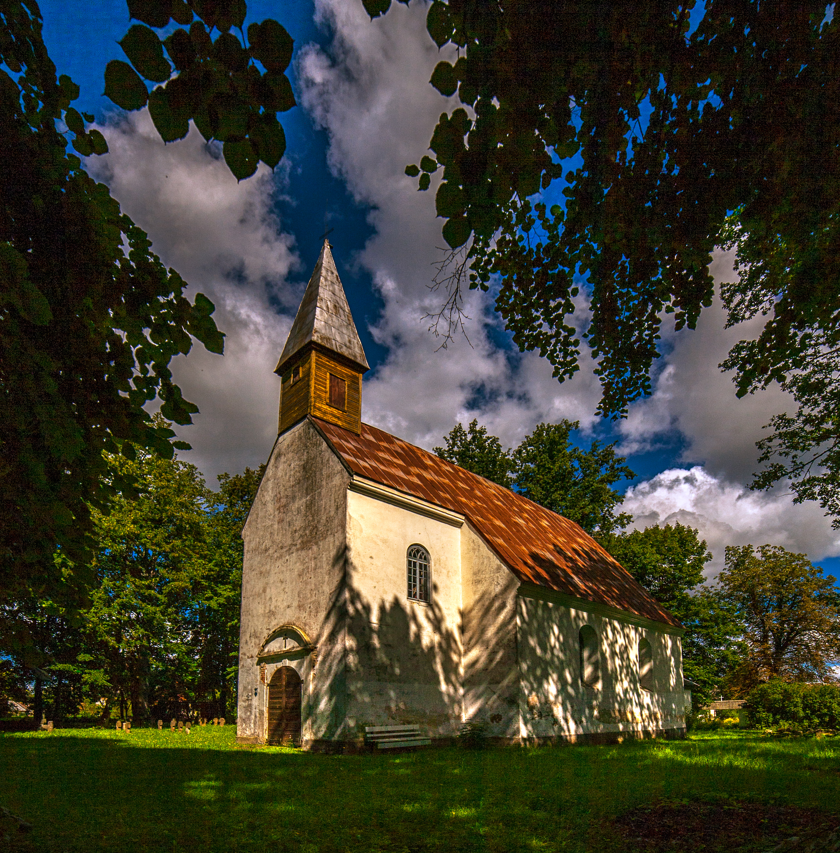 Zasas luterāņu baznīca, Zasa